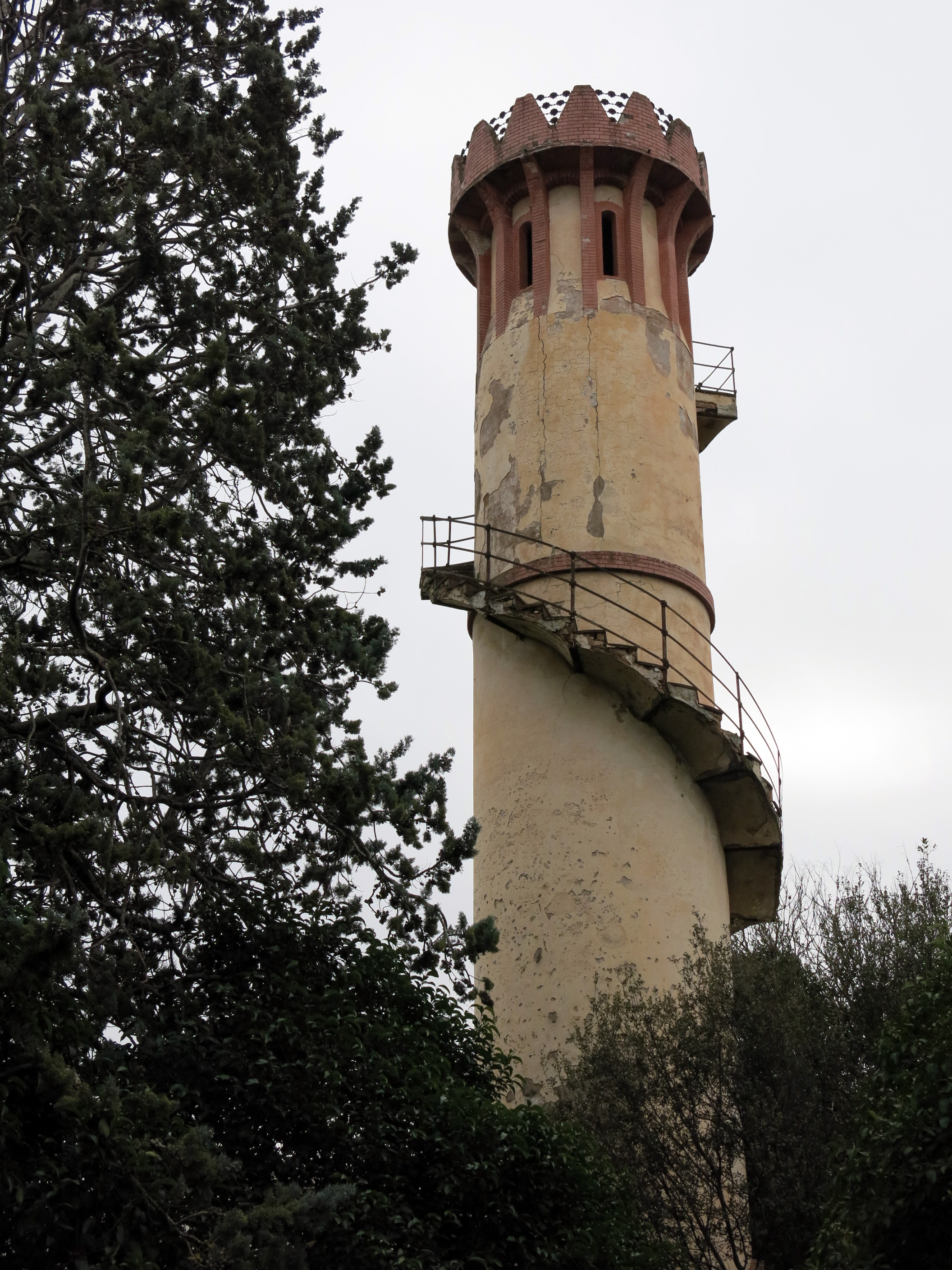 Casa Llissach (Santpedor)